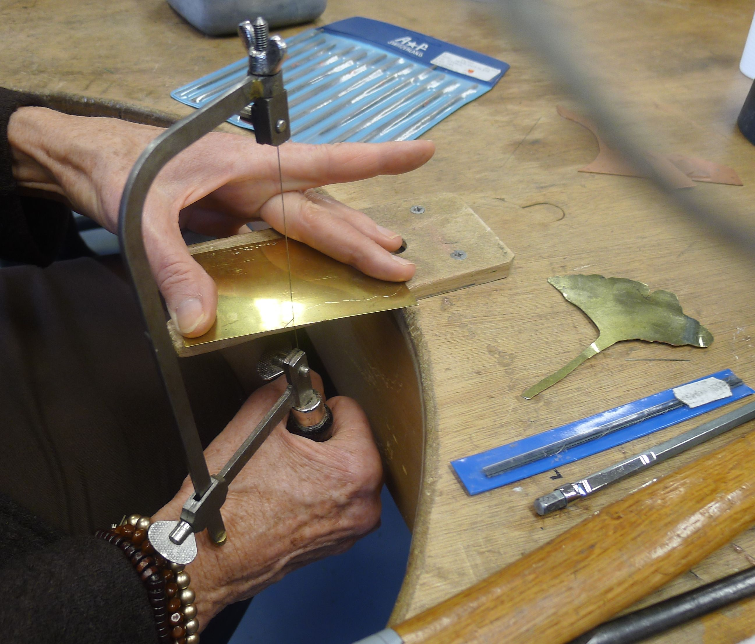 Een professionele figuurzaag, gehanteerd door een sieradenkunstenaar.